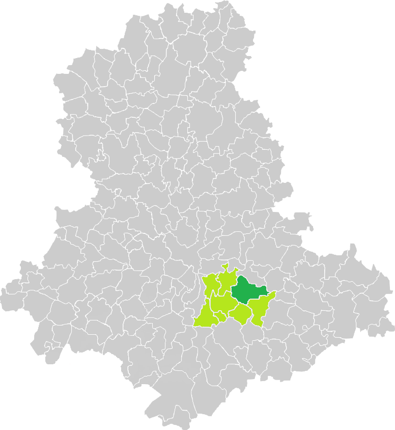 Carte de situation de la commune de Saint-Paul (en vert foncé) dans le votre Canton (en vert clair) sur une carte des communes de la Haute-Vienne